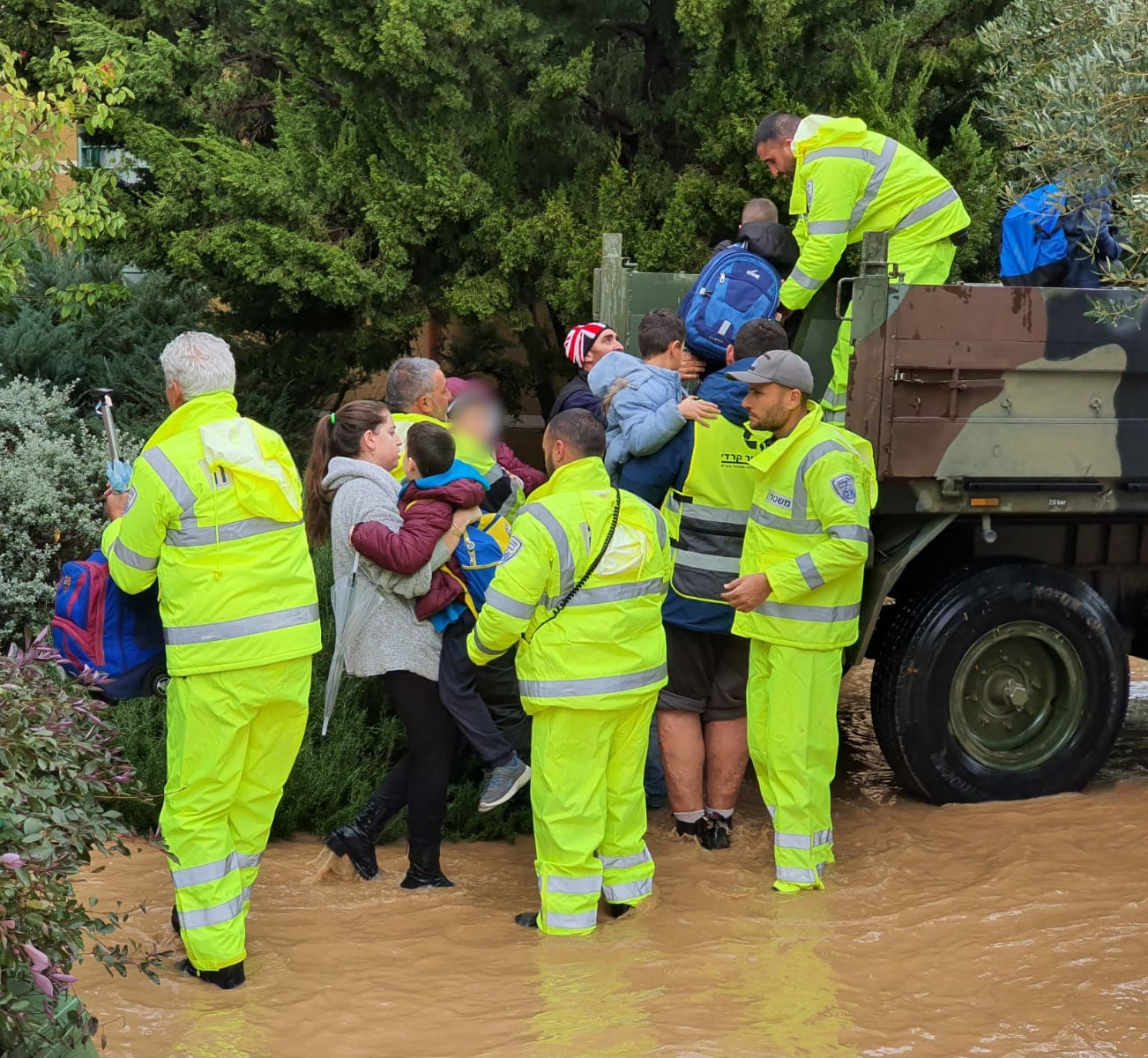 השוטרים שלנו פועלים בשטח תחת גשם שוטף ומזג אוויר סוער, מחלצים אזרחים שנקלעו להצפות, מכוונים את התנועה בכבישים ונכונים להגיב לכל קריאה.